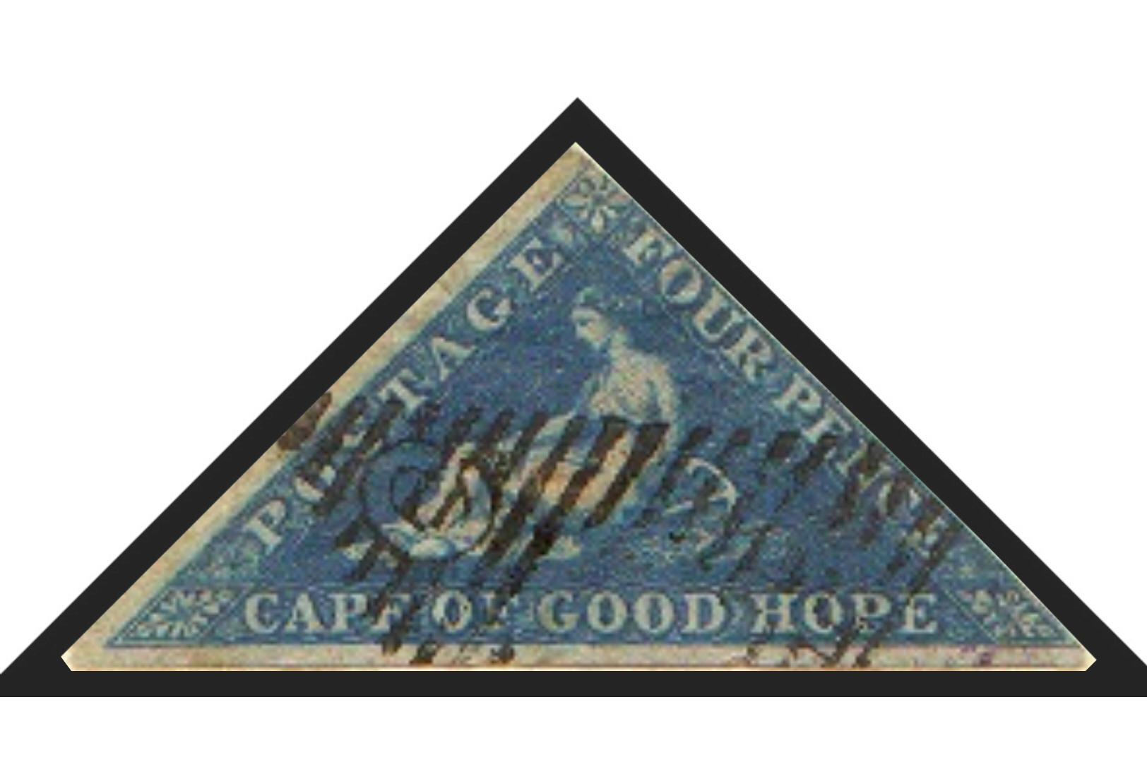 Dreiecksmarke - Kap der guten Hoffnung, Marke von vor 1863 Quelle: selbst erstellt